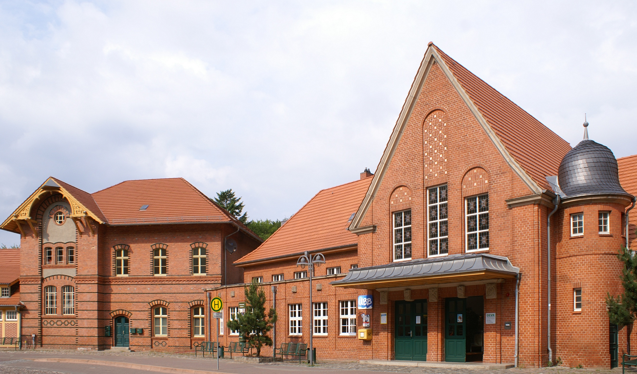 Bahnhof Seebad Heringsdorf, Eingangsbereich